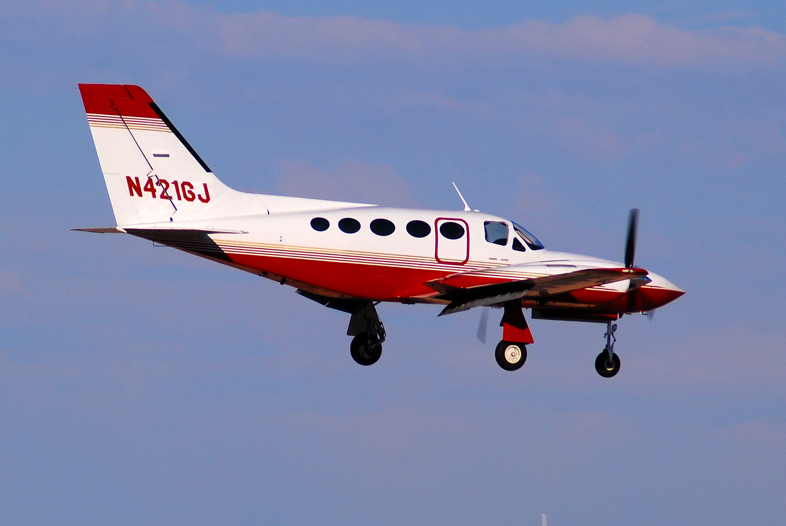 Aero Nevada Cessna 421C N421GJ